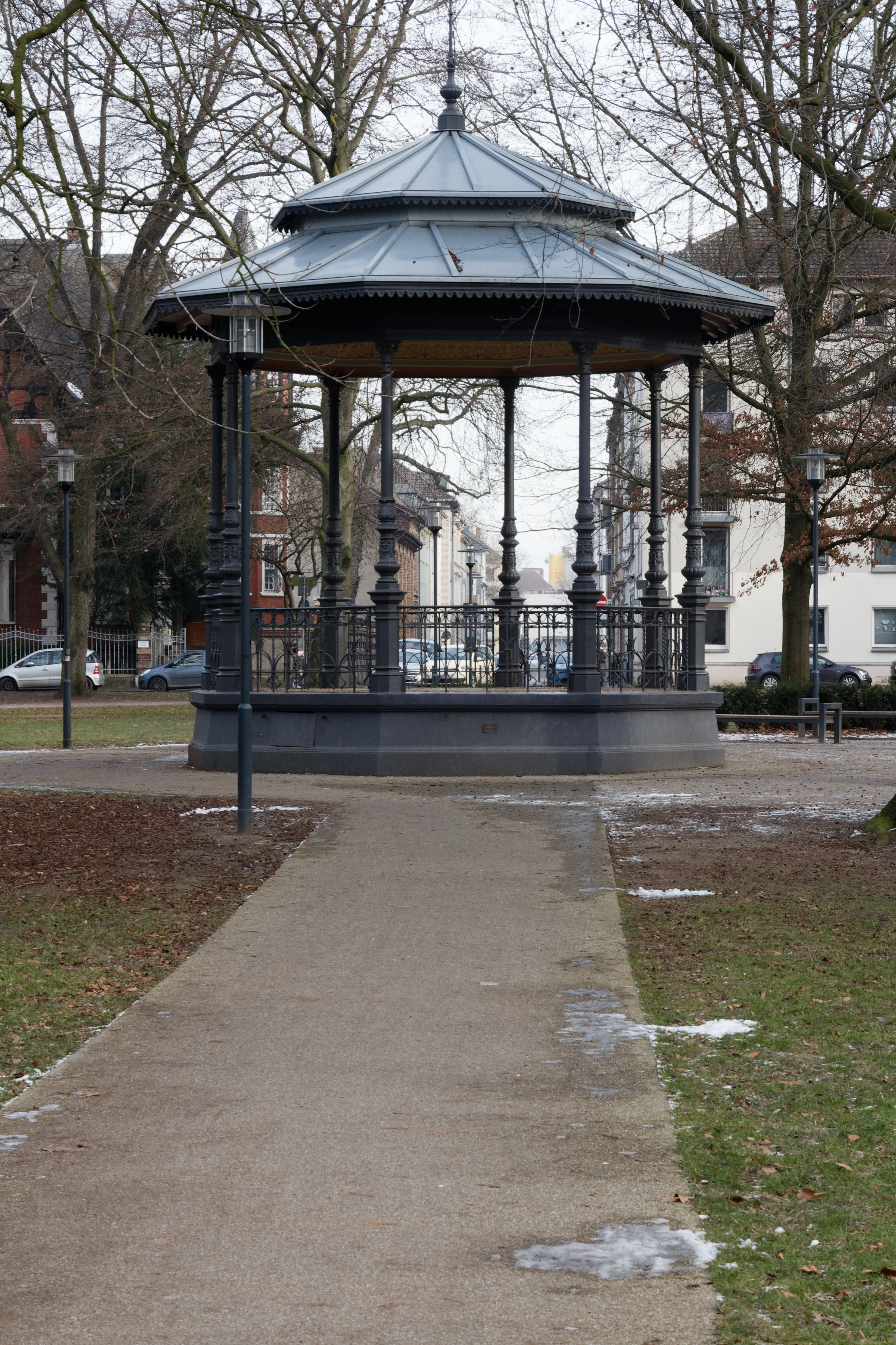 Stadtgarten Krefeld; Musikpavillon